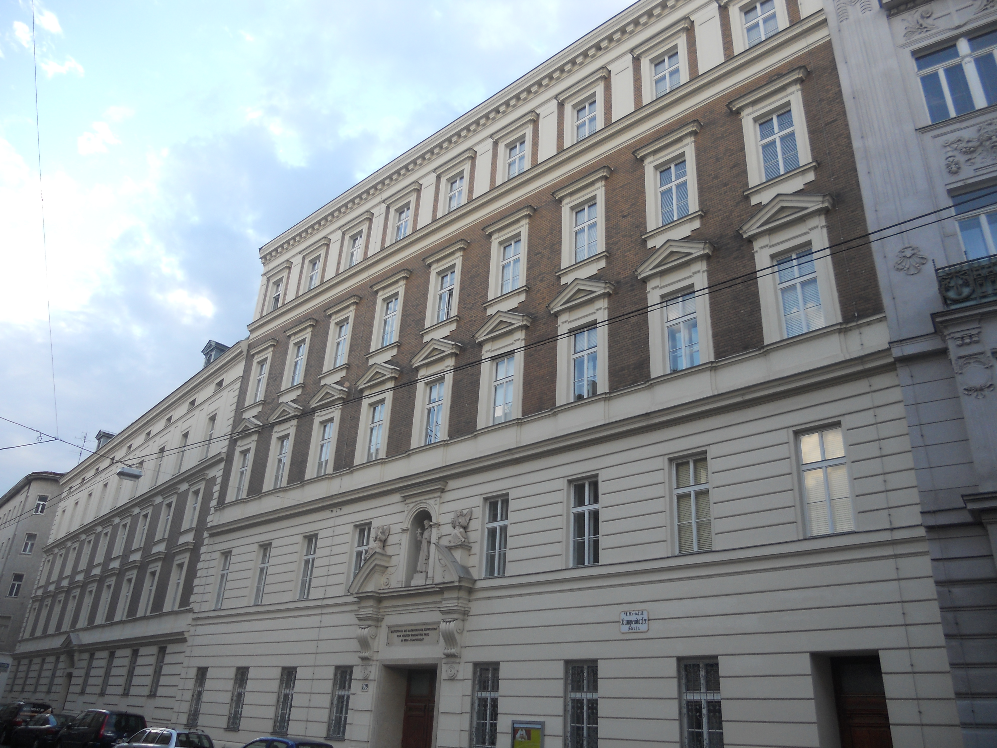 Kloster und Spital der Barmherzigen Schwestern in Wien, Gumpendorferstraße 108-110